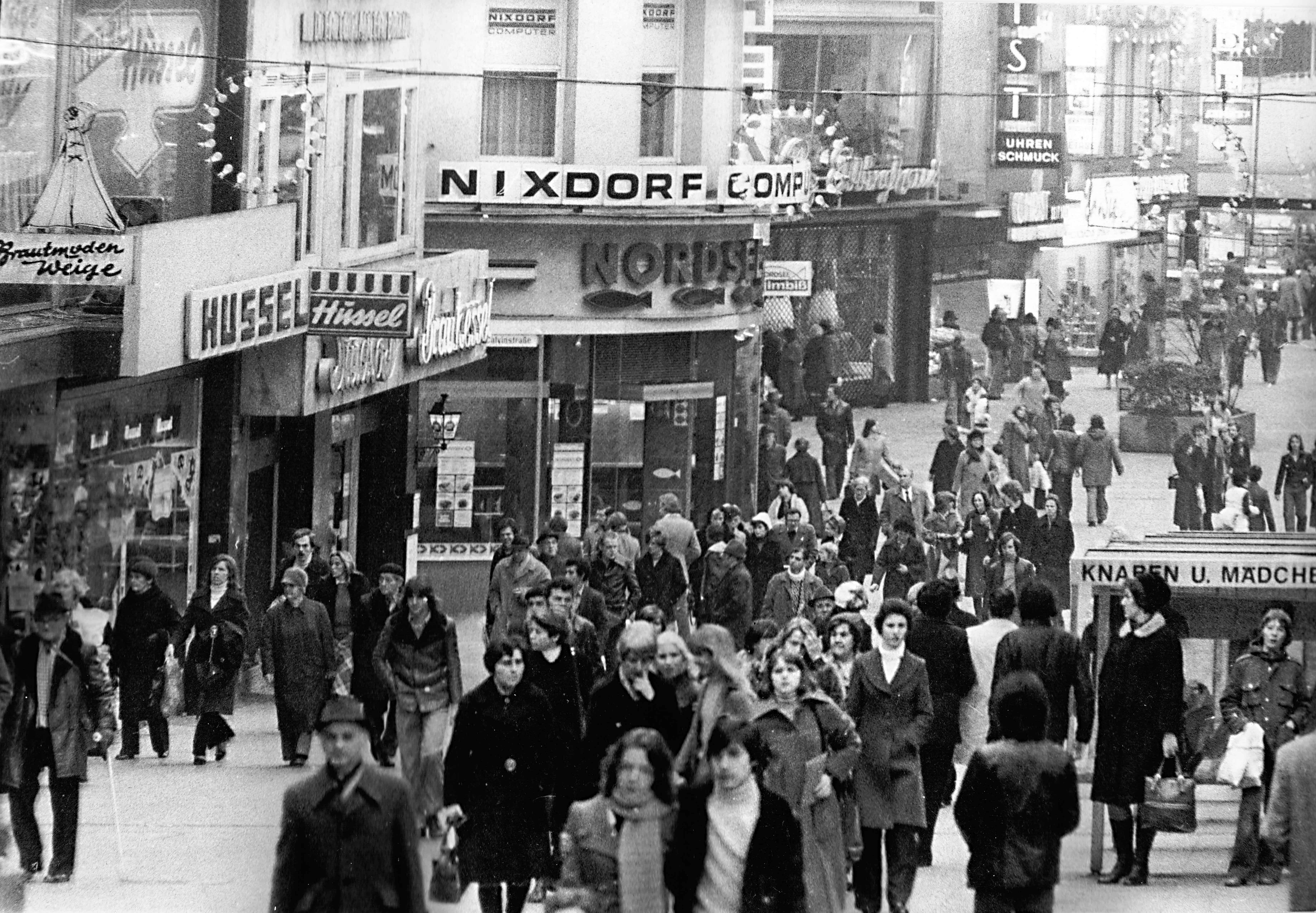 Fußgängerzone Alte Freiheit, fotografiert mit 200mm Tele etwa vom Schwebebahnhof Döppersberg aus.